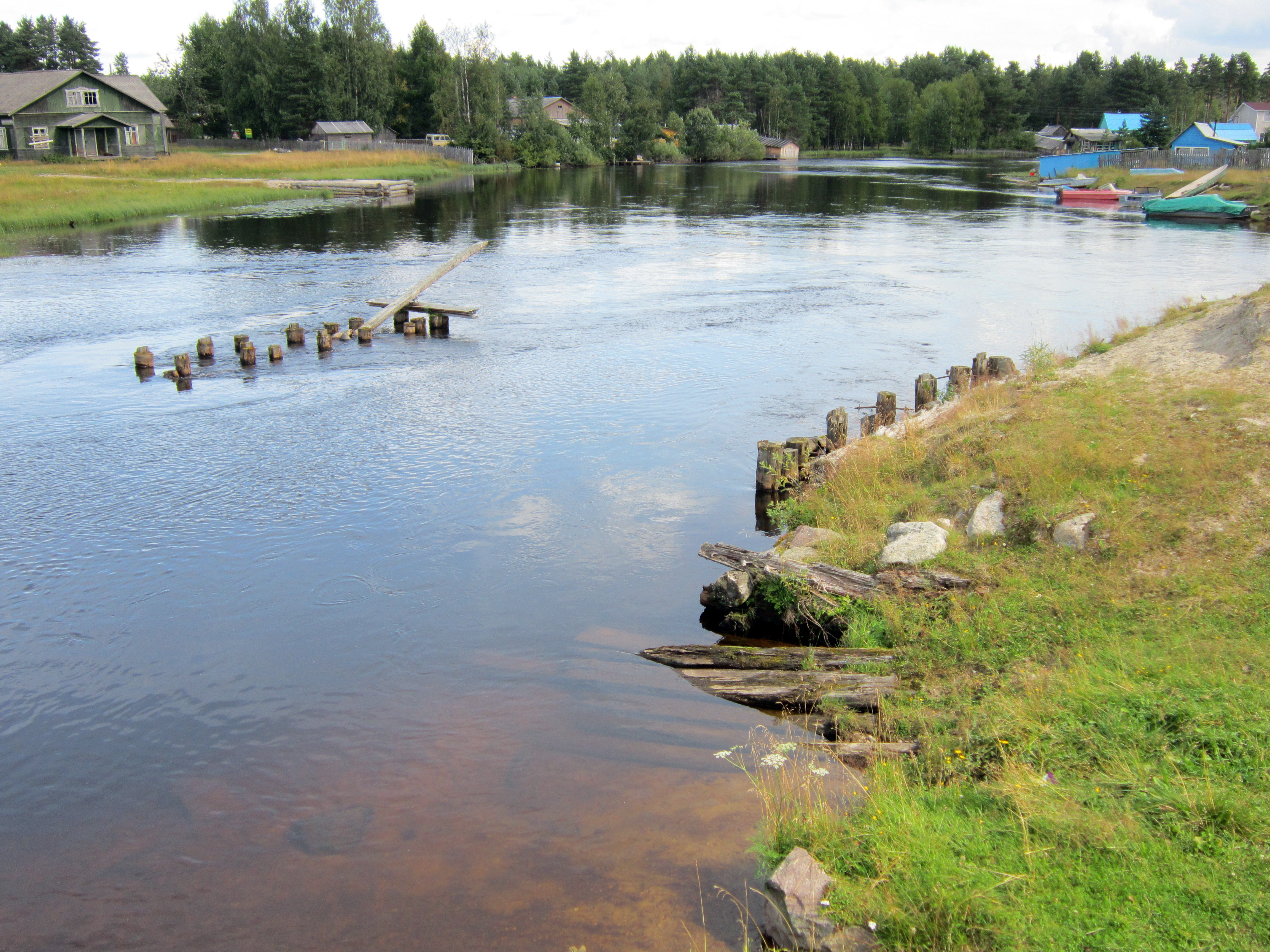 р. Сяпся в посёлке Сяпся